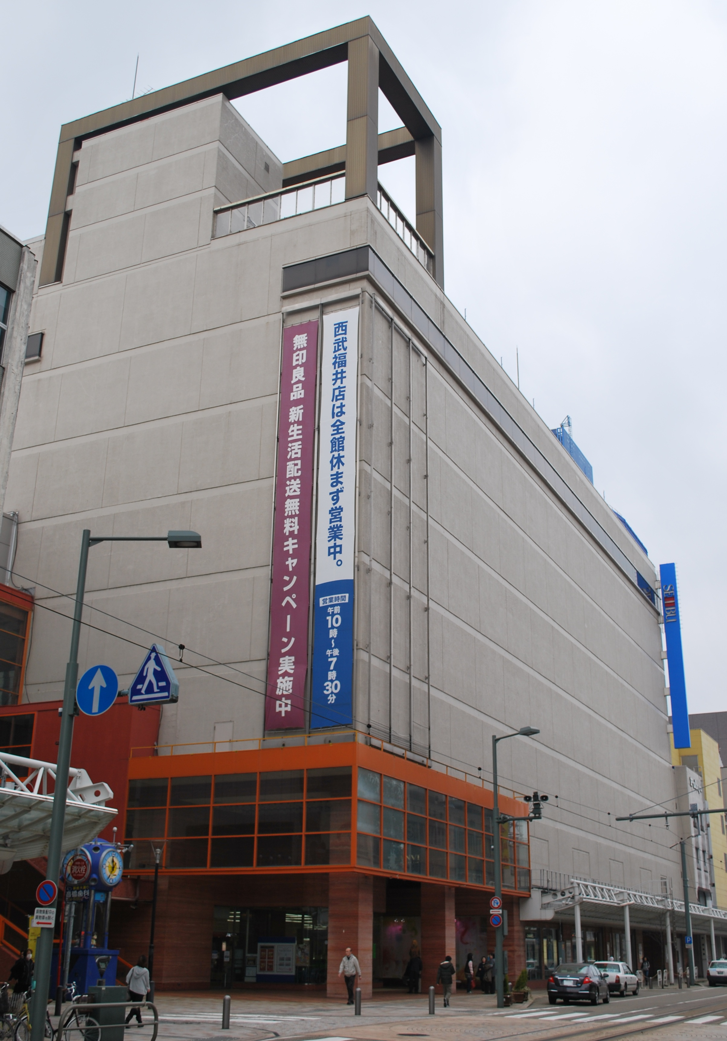 西武福井店本館。2011年3月15日撮影。